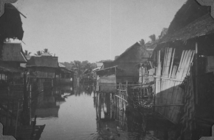 Foto. Paalwoningen in het water, Kema